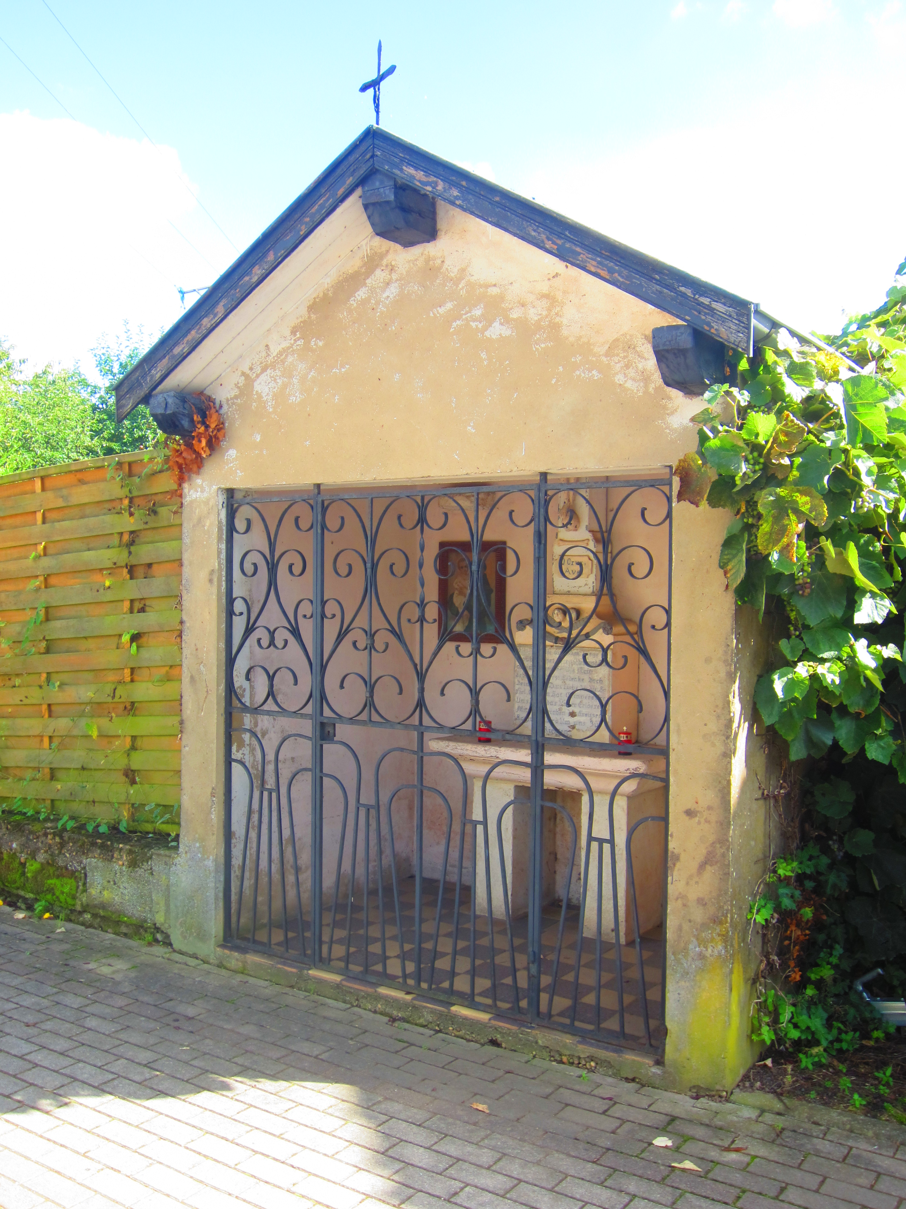 Dalem chapelle-oratoire